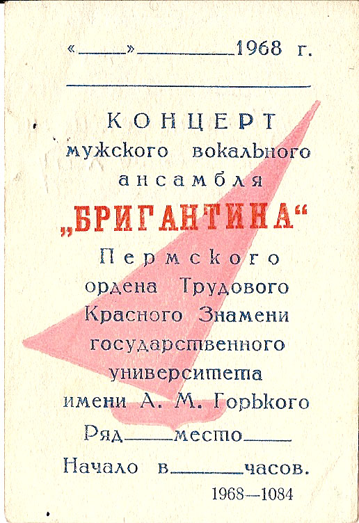 Пригласительный билет на концерт ансамбля "Бригантина" 1968 года с эмблемой "Бригантины", разработанной Юрием Максимовичем Суетиным.